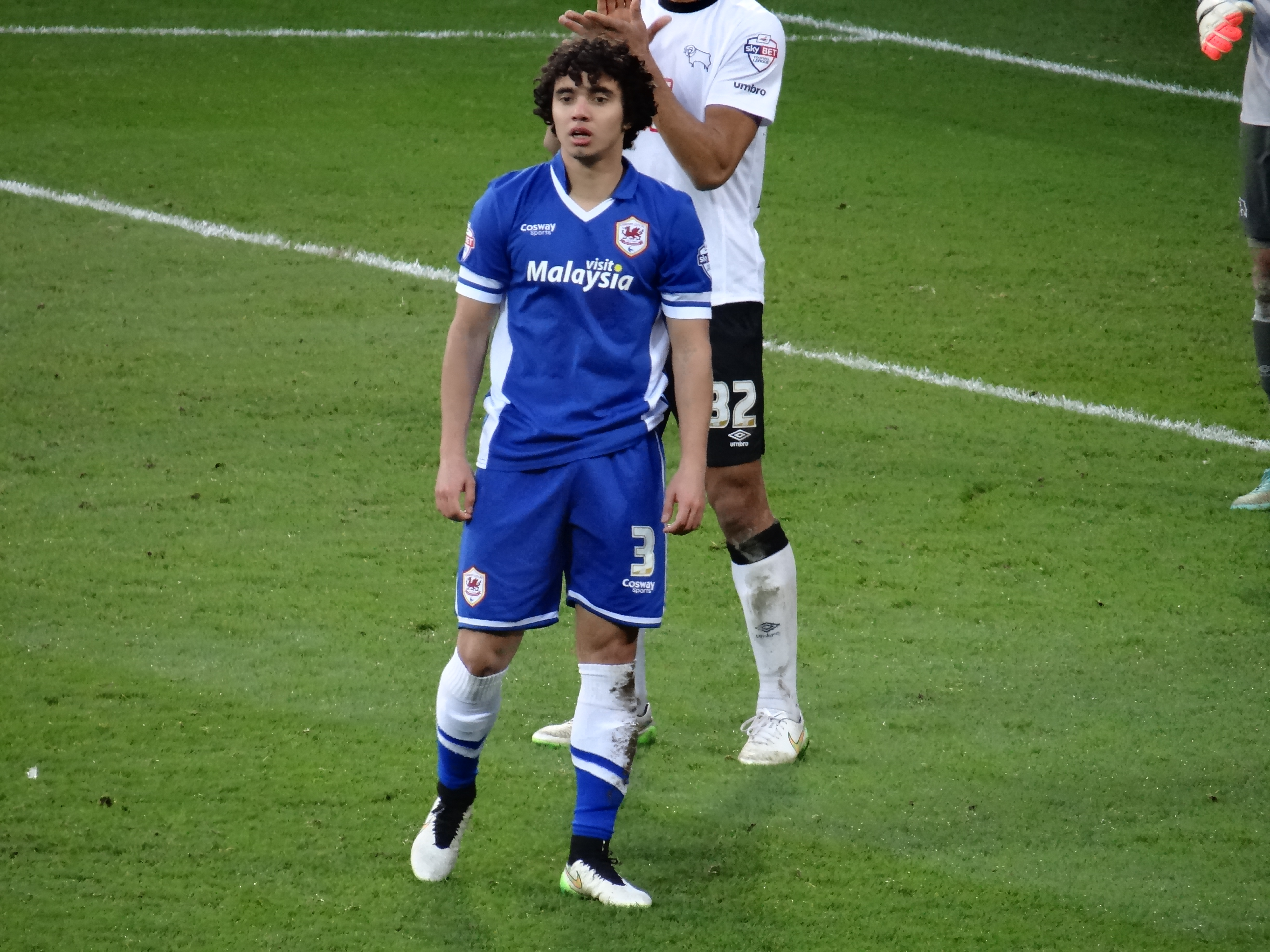 Fabio Pereira da Silva